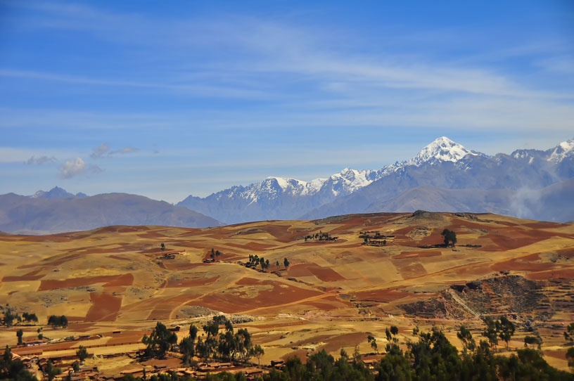 Peru